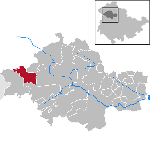 Rodeberg in Thuringia - Unstrut-Hainich-Kreis